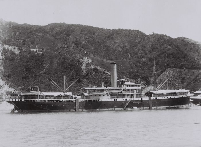 foto. De S.S. Van Imhoff van de KPM in de baai van Gorontalo